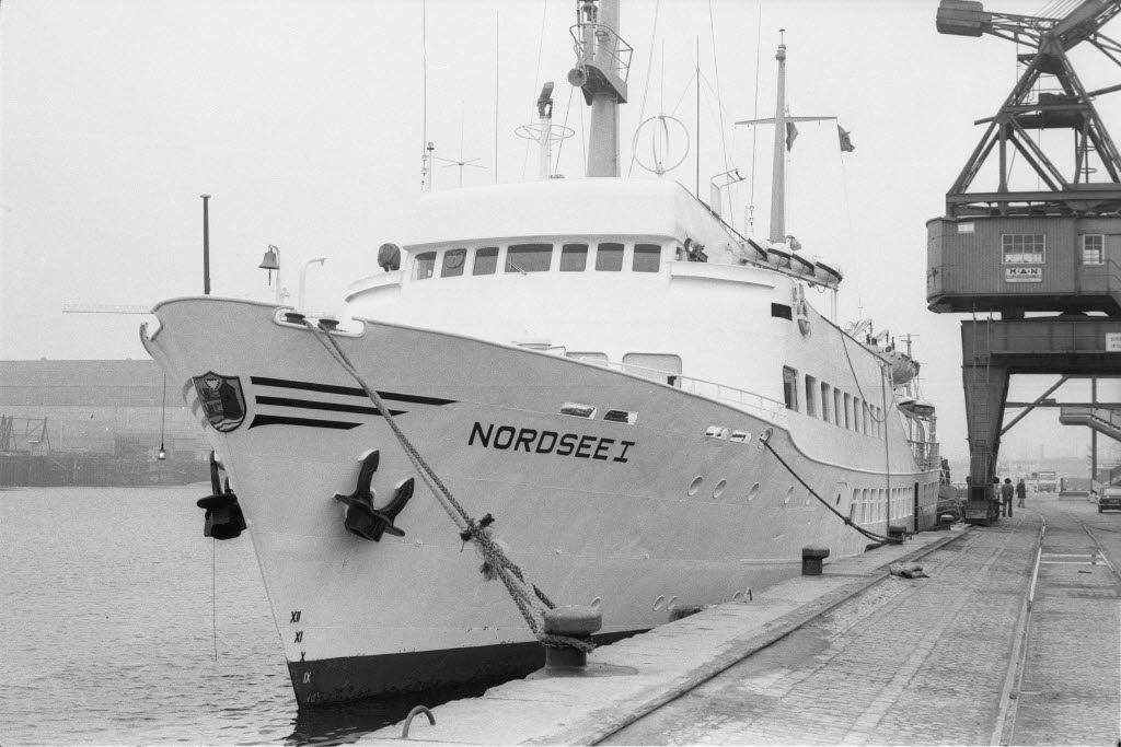 am Bollhörnkai.